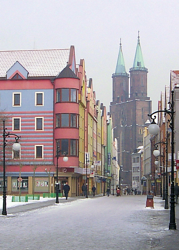 UIica Najświętszej Marii Panny w Legnicy